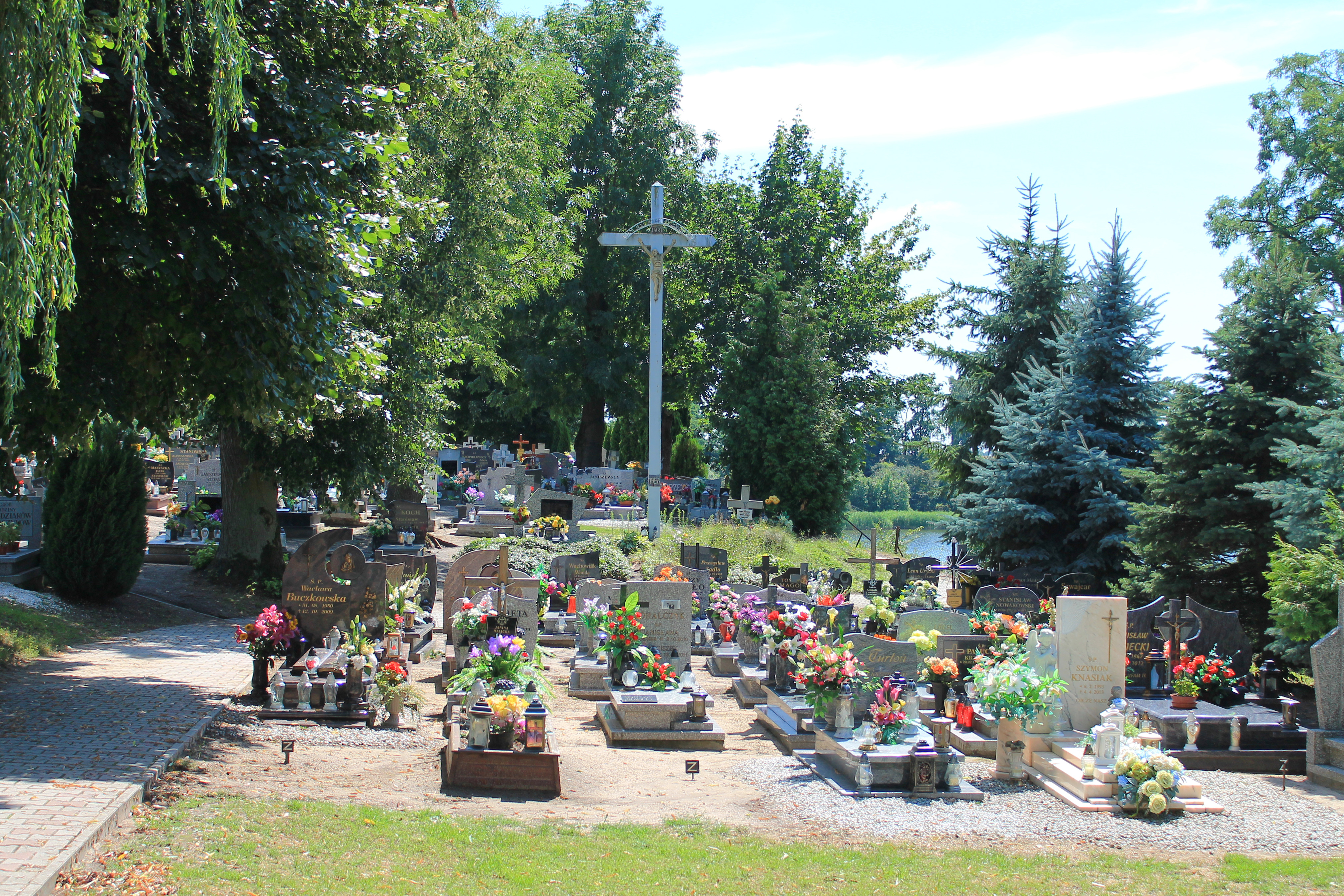 Cmentarz przy kościele katolickim św. Mikołaja i św. Jadwigi w Dębnicy